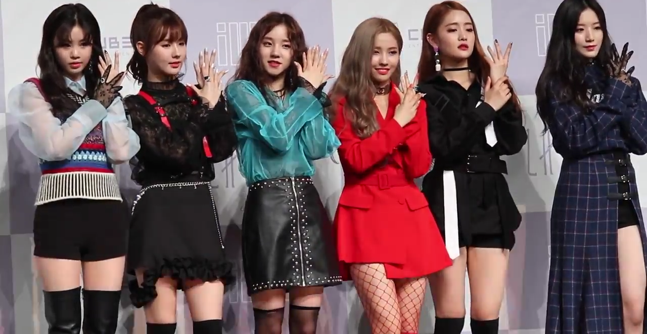 (G)I-DLE no horário de fotos do 'Latata' Showcase em 2 de maio de 2018